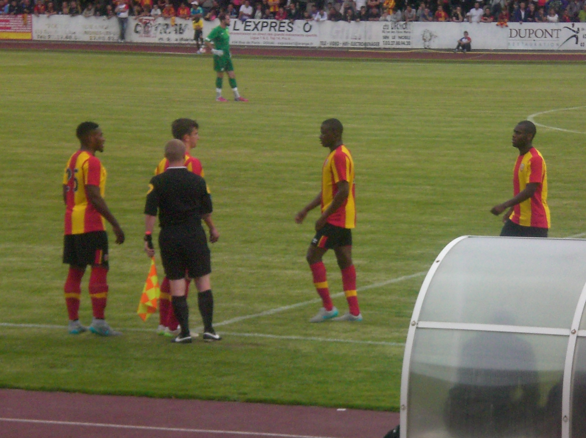 Loïck Landre (numéro 25) et Hugo Robert (deuxième en partant la gauche ; partiellement caché par l'arbitre) remplaçant Deme N'Diaye et Jordan Ikoko